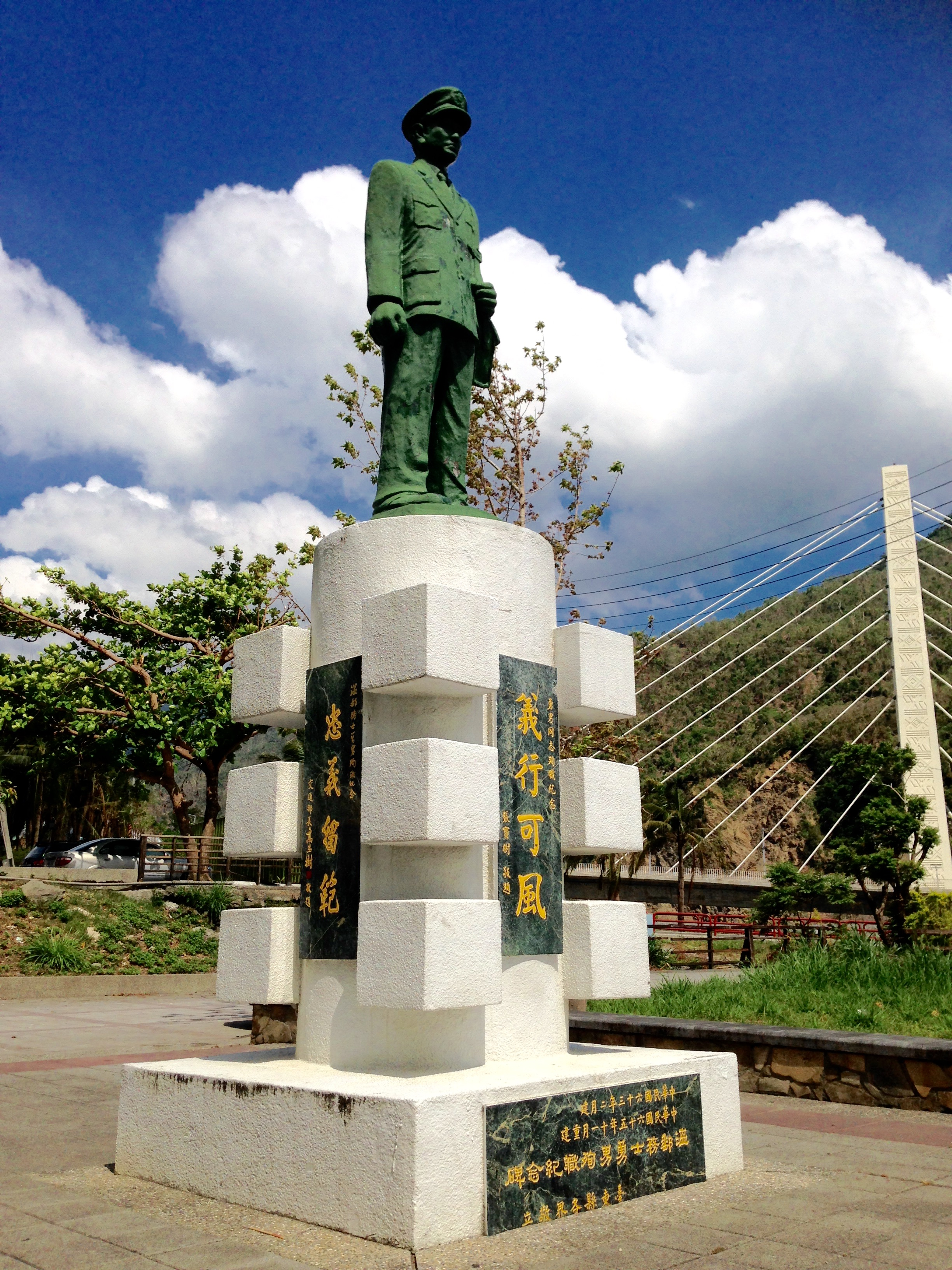 中文（台灣）: 溫勇男銅像與勇男橋